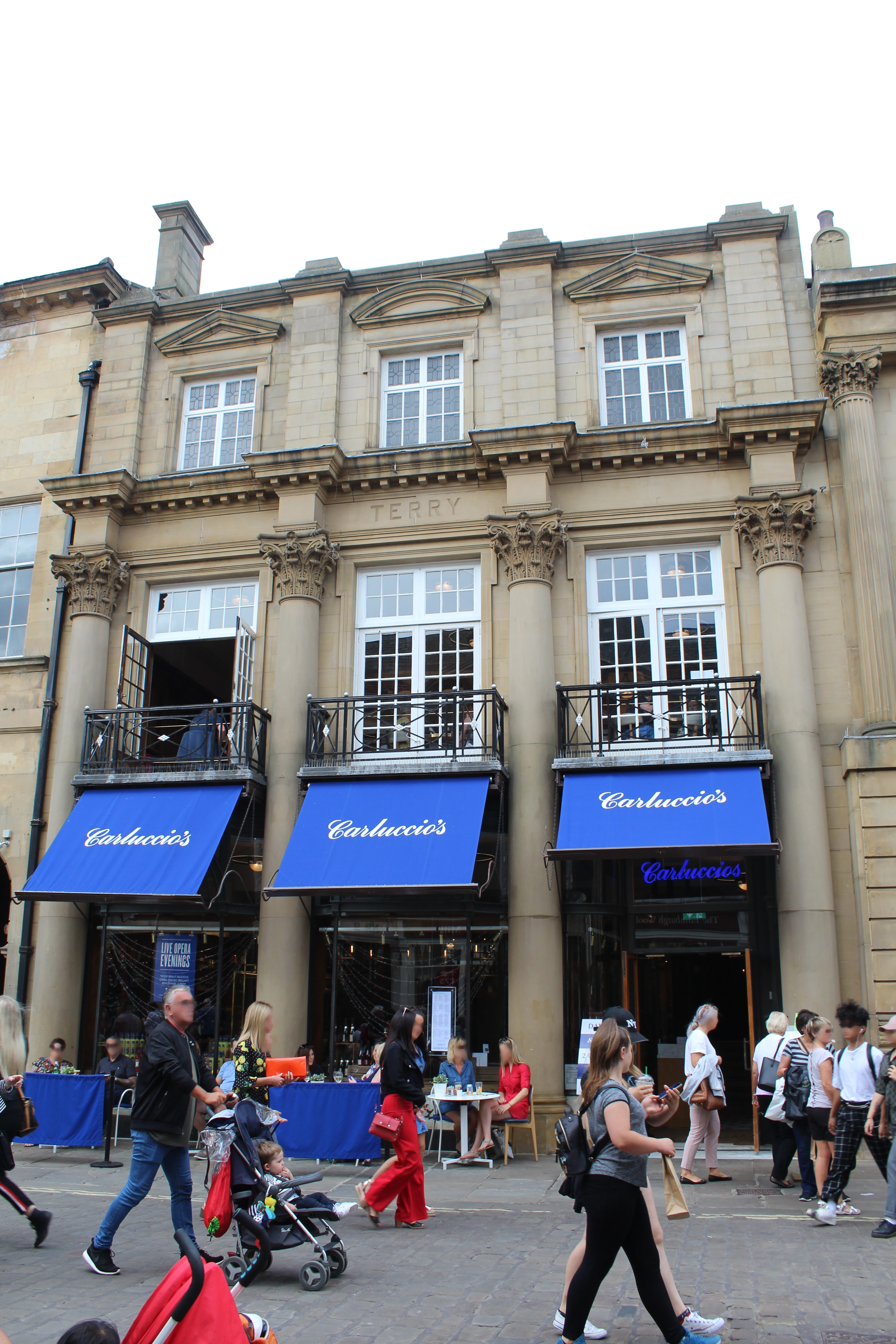 Immeuble, 3 St Helen's Square, York.